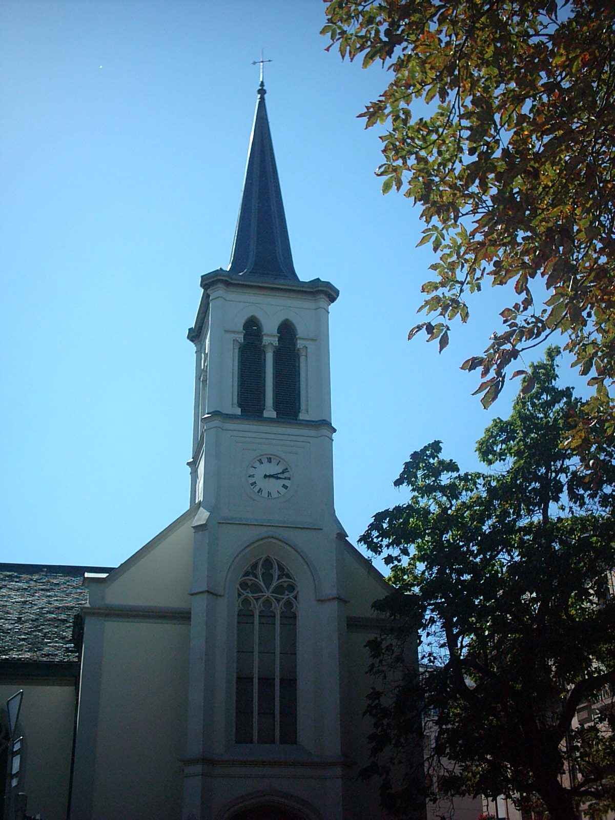 Temple de Plainpalais à Genève (Suisse)